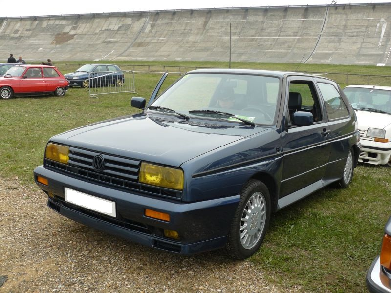 Français cadien: Montlhery avril 2012